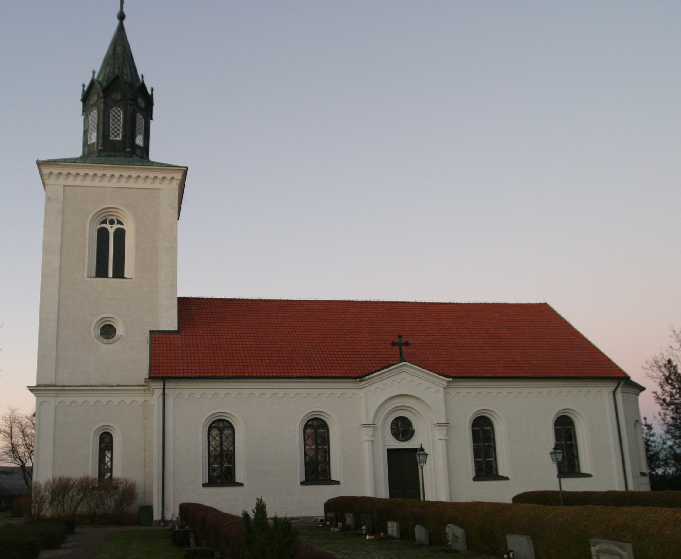 Ledbergs kyrka, Östergötland